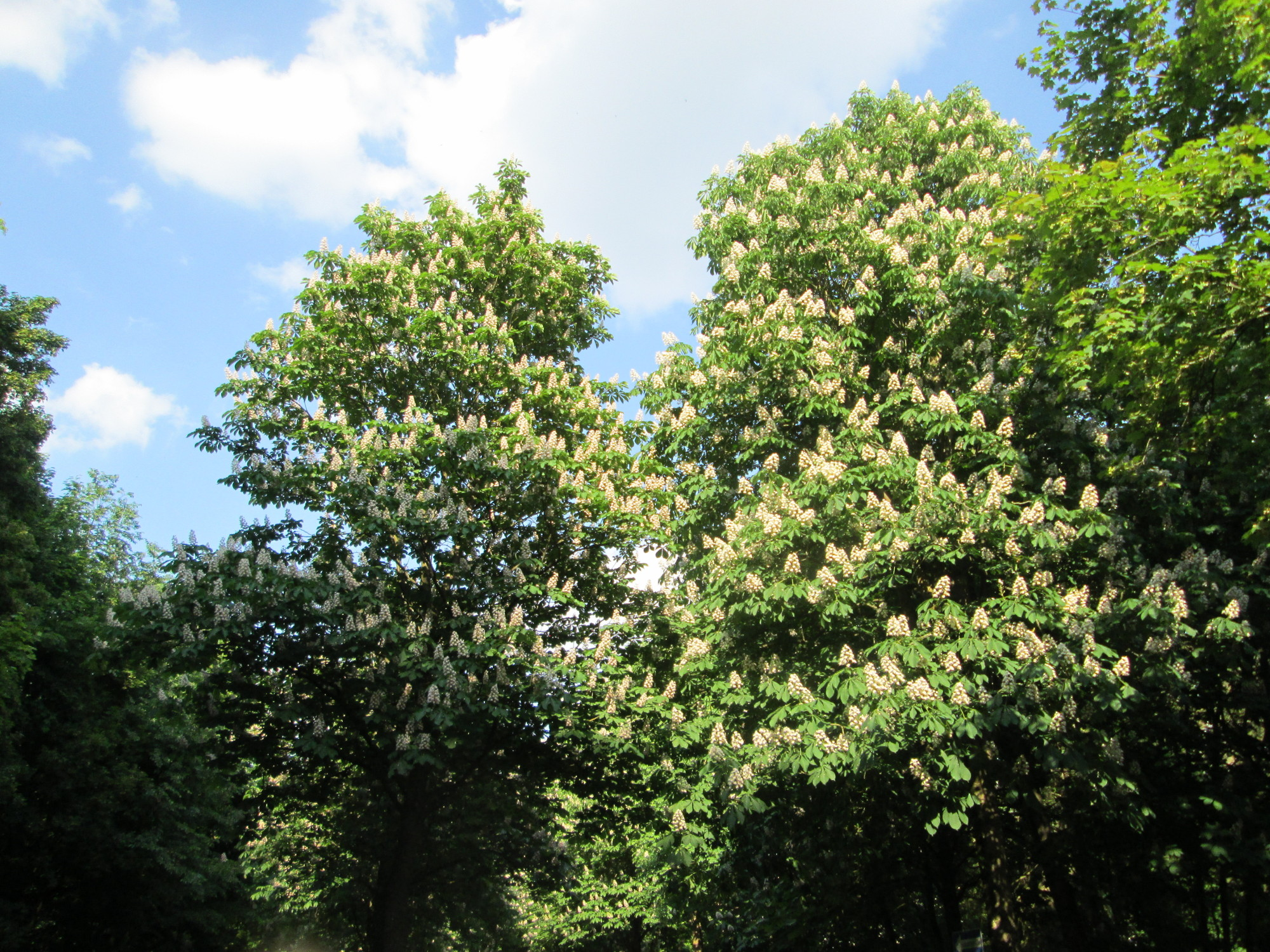 Blühende Rosskastanie (Aesculus hippocastanum) in Sankt Arnual